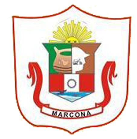 Escudo Municipal de Marcona (Ica-Perú).